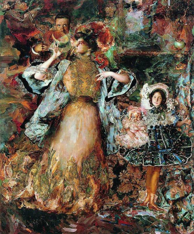 Автопортрет с женой и дочерью. Региональный государственный фонд поколений Ханты-Мансийского автономного округа